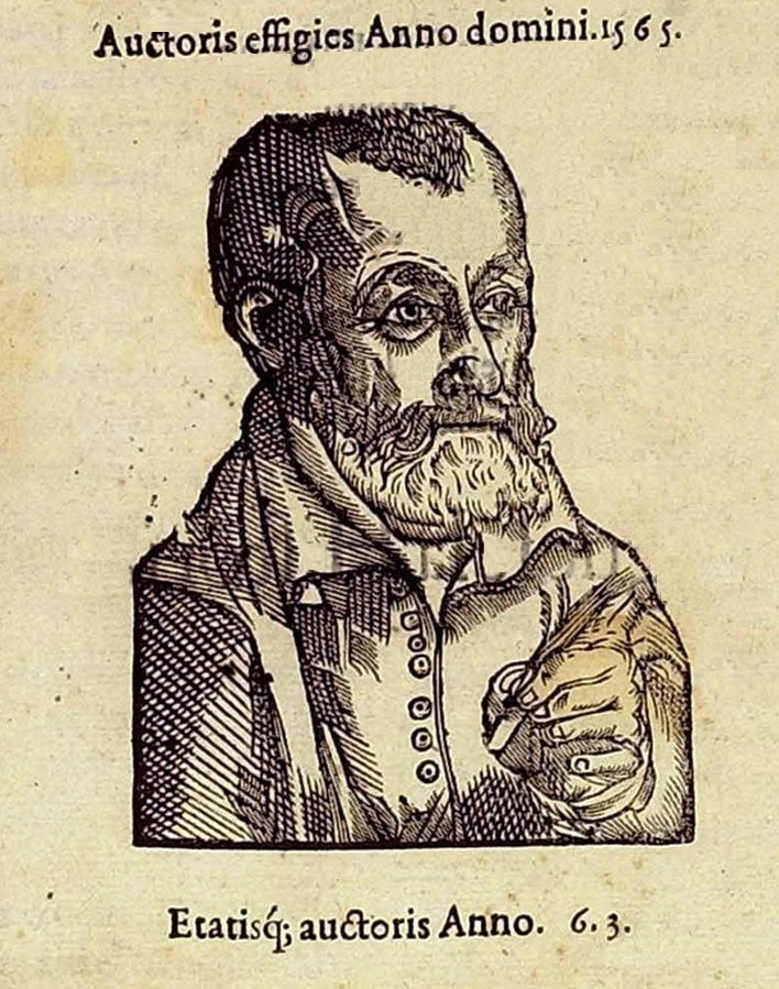 Retrato de Rafael Martín de Viciana, 1565. Xilografía anónima tras la portada del Libro quarto de la Crónica de la Ínclita y coronada ciudad de Valencia, editado en Barcelona por Pablo Cortey, 1566. (Ver José V. Gómez Bayarri, "La tradición cronística valenciana: Martín de Viciana", p. 22)